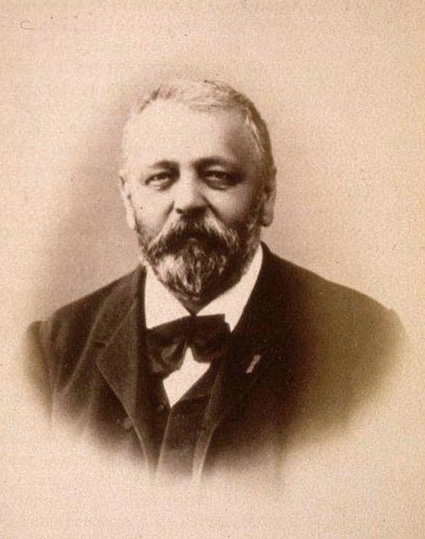 Musculus, Frédéric-Alphonse. Meyer, Antoine. Photographe. 1890. Bibliothèque nationale et universitaire de Strasbourg